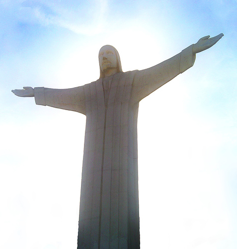 Cristo de las Noas, Torreon, Mexico